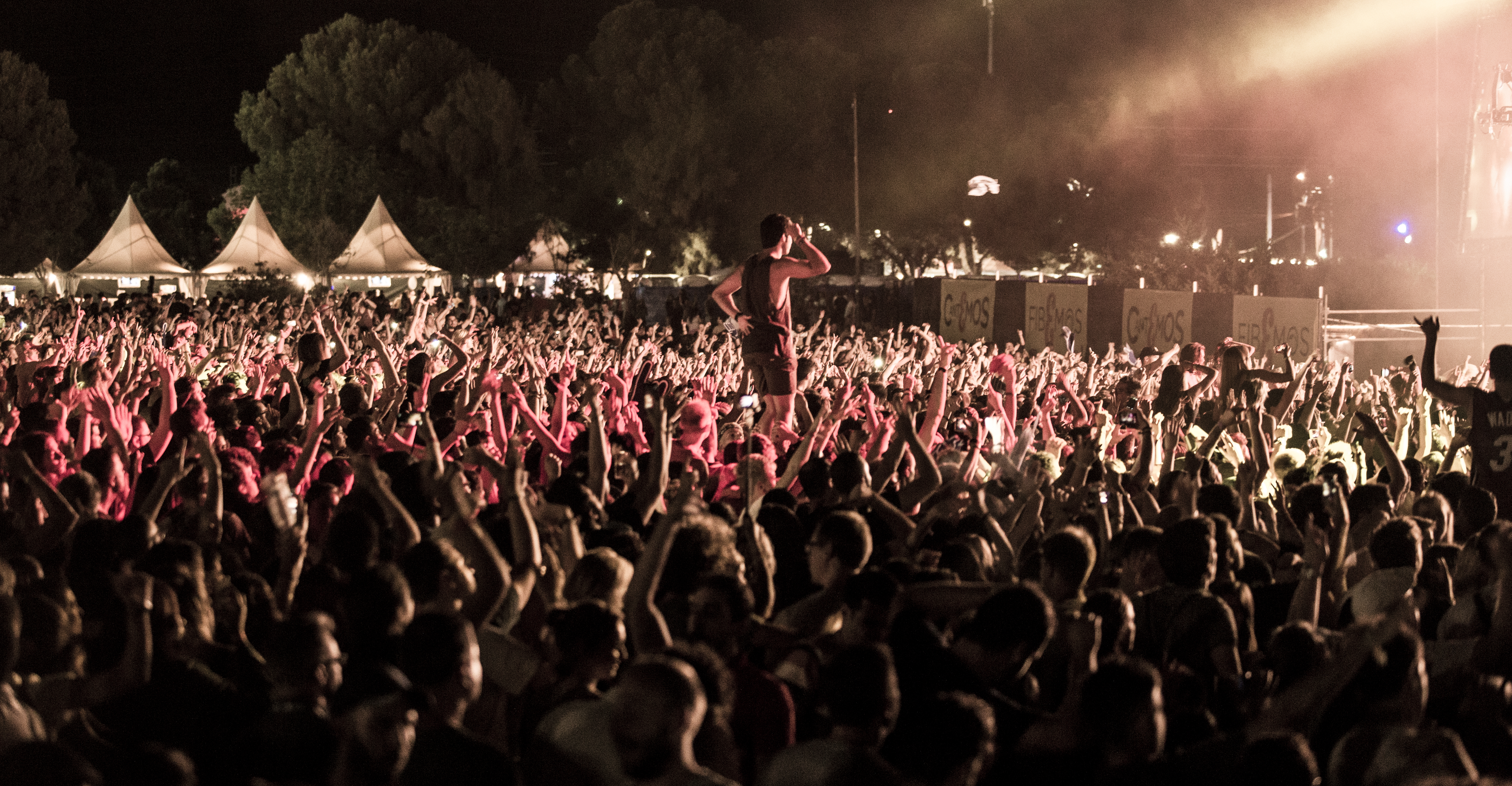 Noche del jueves 14 de julio